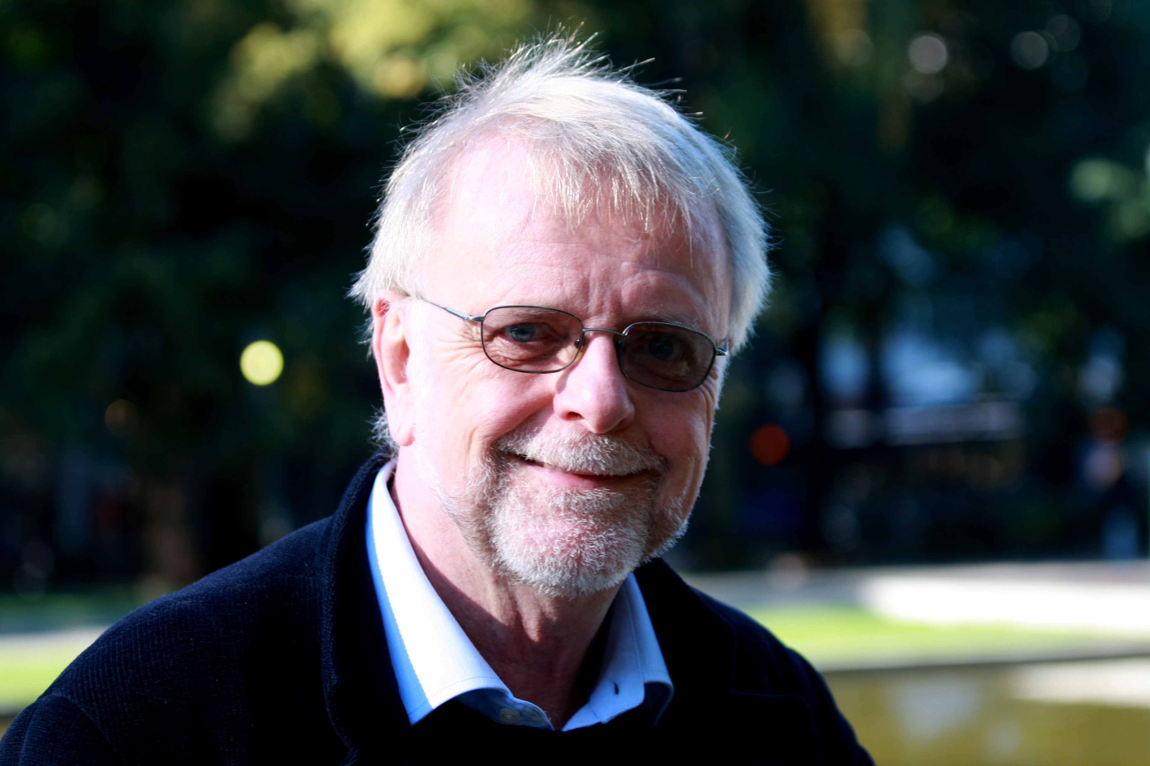 Klaus Hagerup, forfatter